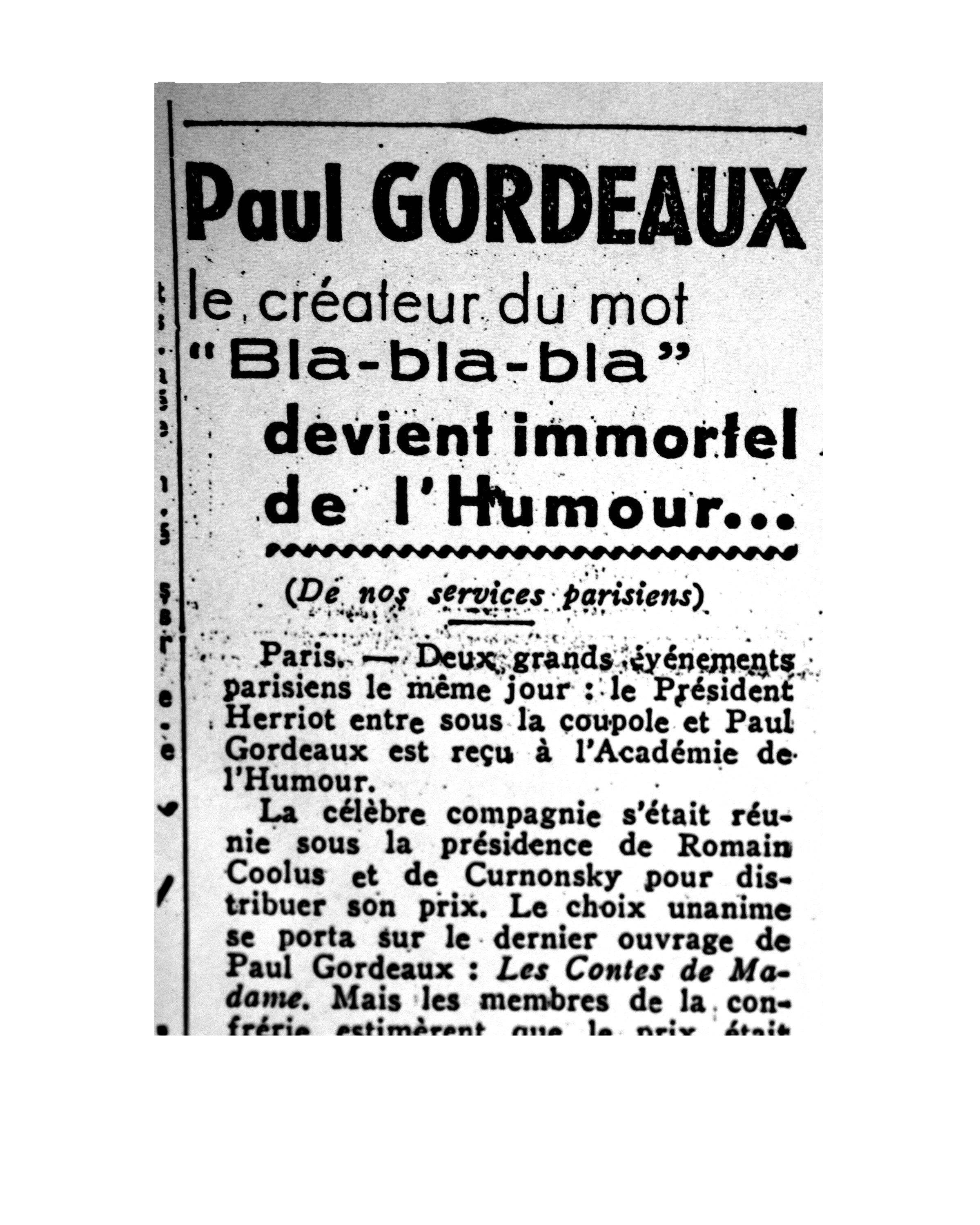 Extrait d'un journal français paru très vraisemblablement en 1946, année au cours de laquelle Paul Gordeaux, immortel de l'humour fut élu à l'Académie de l'humour, et Edouard Herriot à l'Académie française (5 décembre).